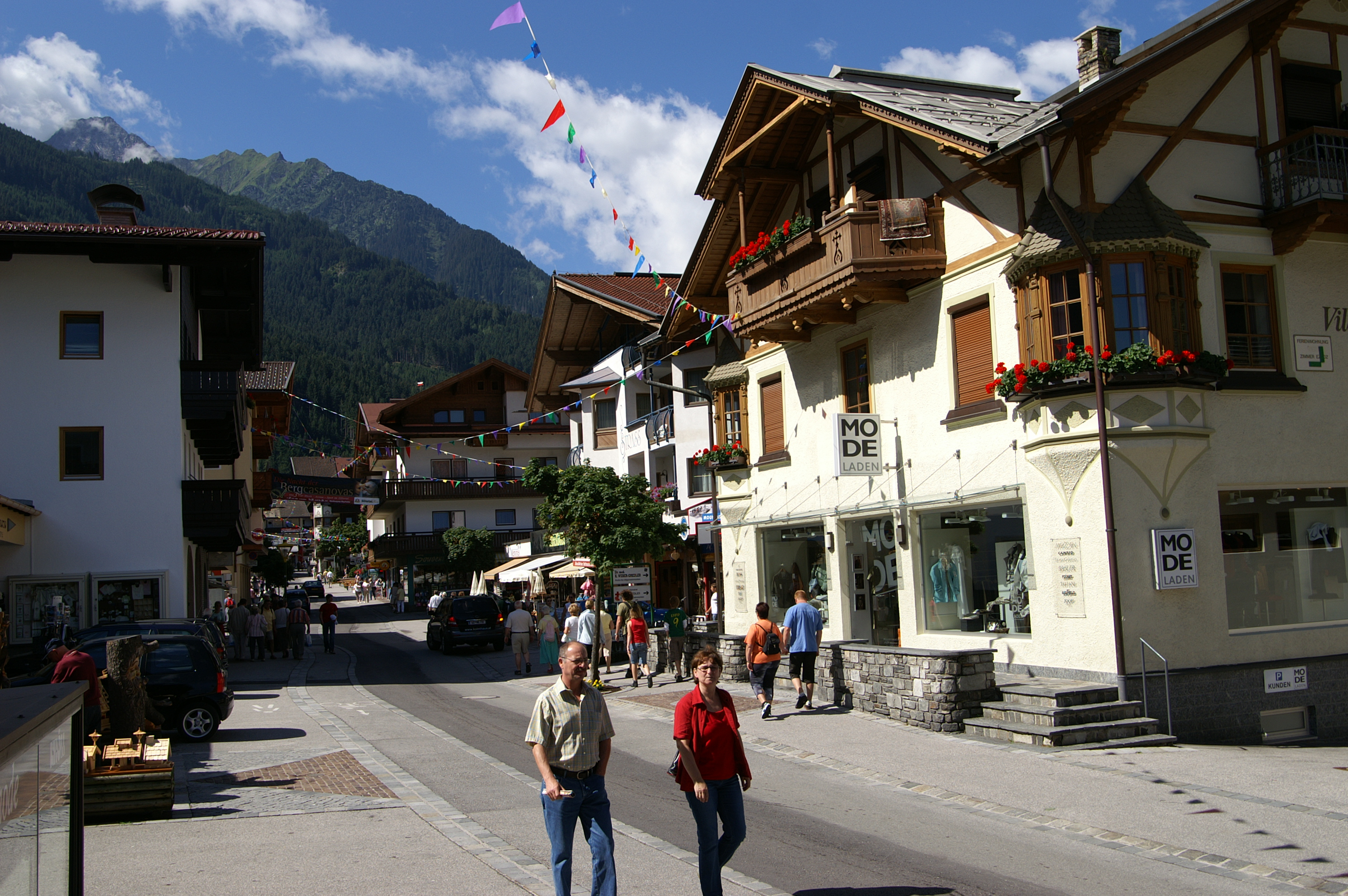 Zillertal Mayrhofen Hauptstrasse